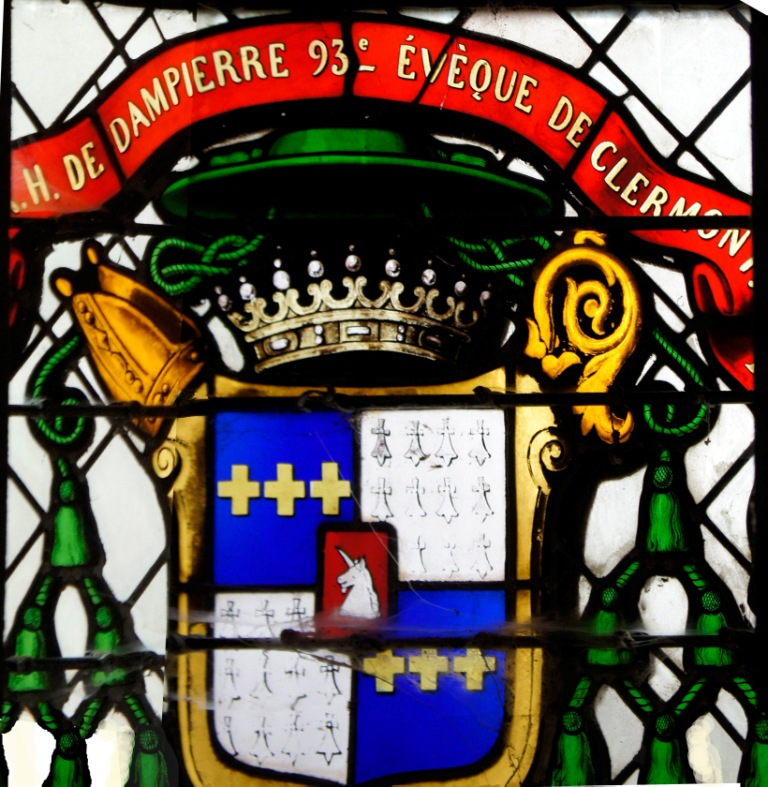 Vitrail de l'église de Hans, Henri de Dampierre 93e évêque de Clermont.